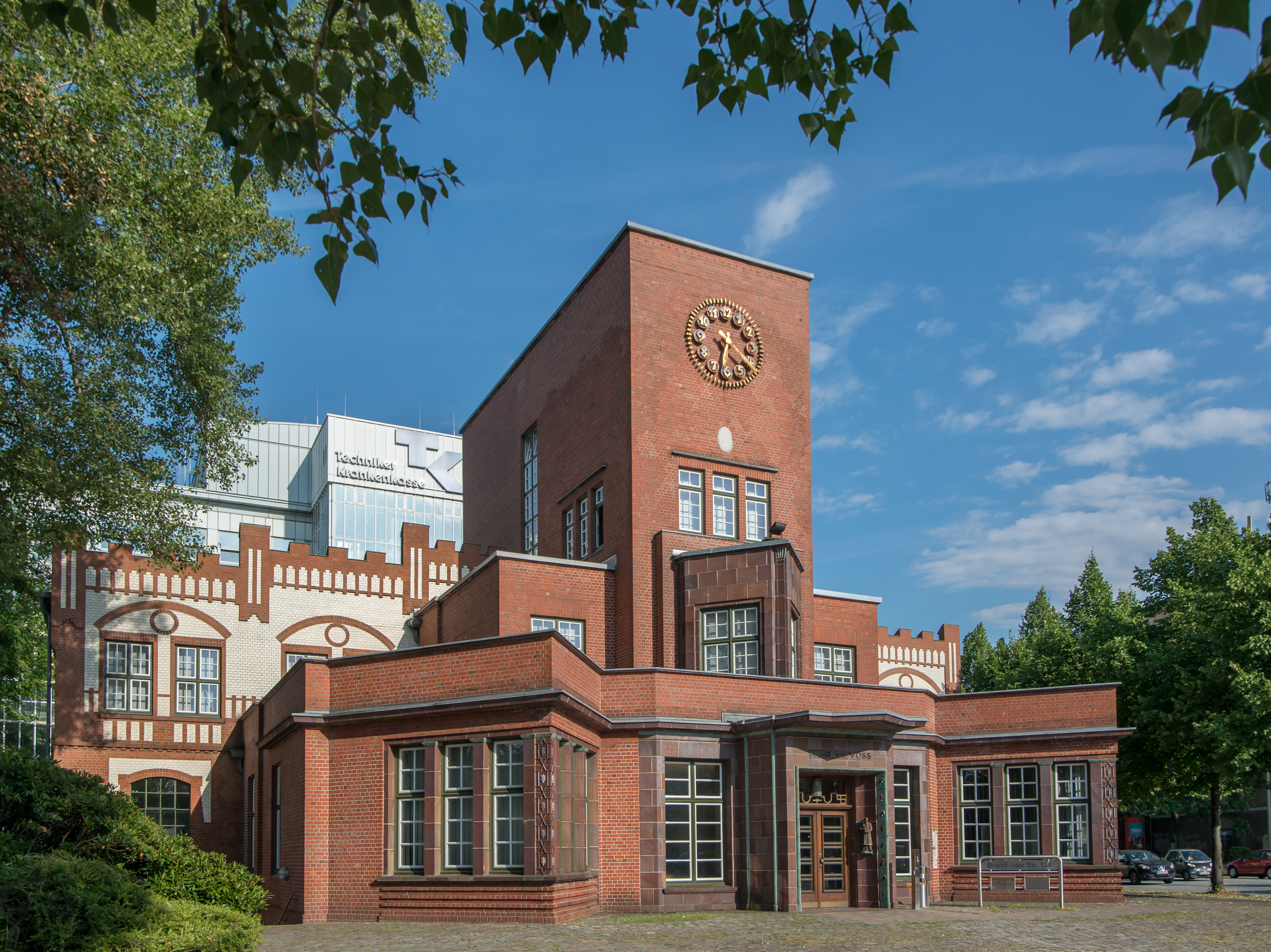 Eingangsbauwerk der ehemaligen Margarinefabrik Voss, Hamburg-Barmbek